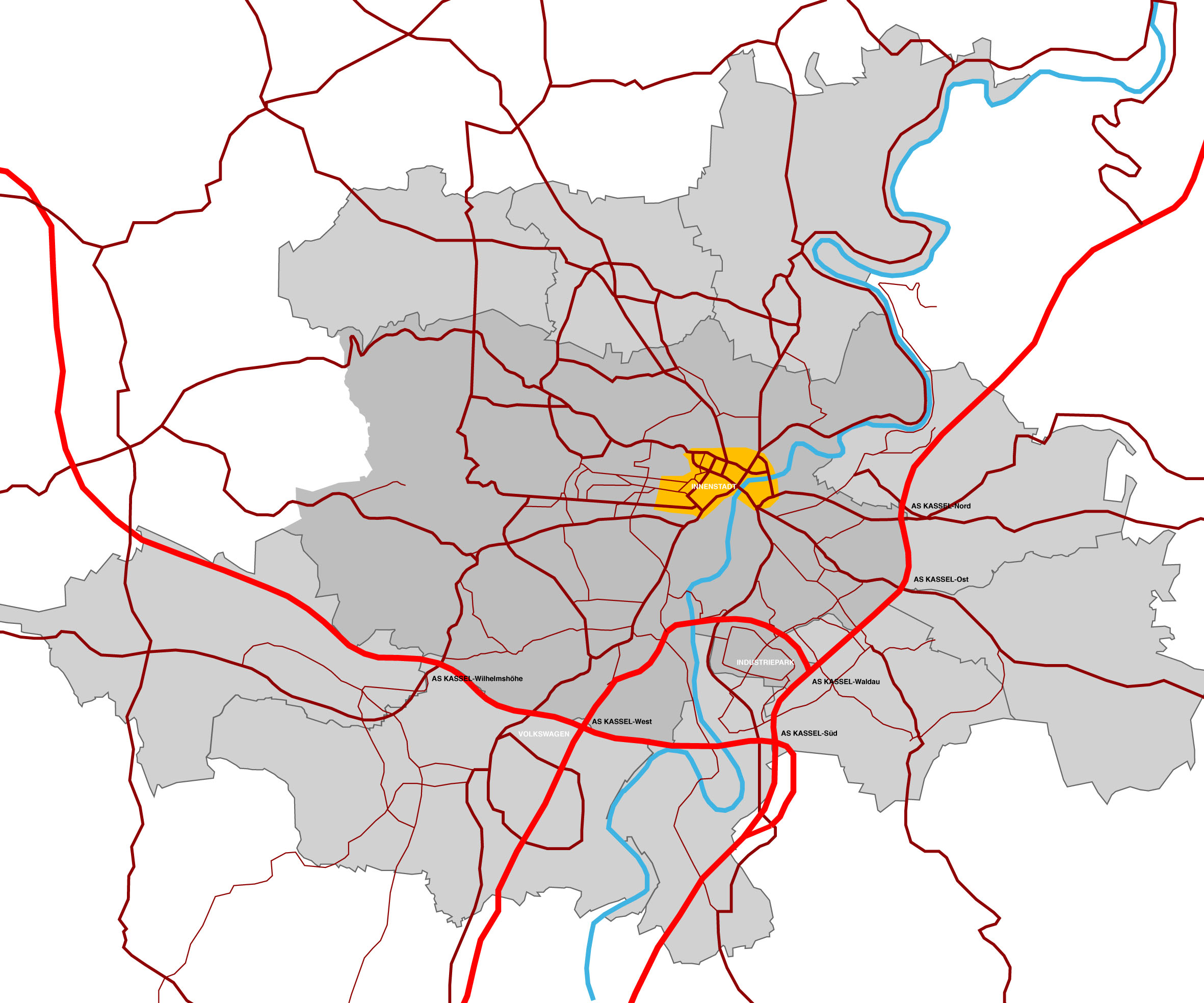 Bundesautobahnen, Bundesstraßen und innerstädtische Verkehrsverbindungen in Kassel